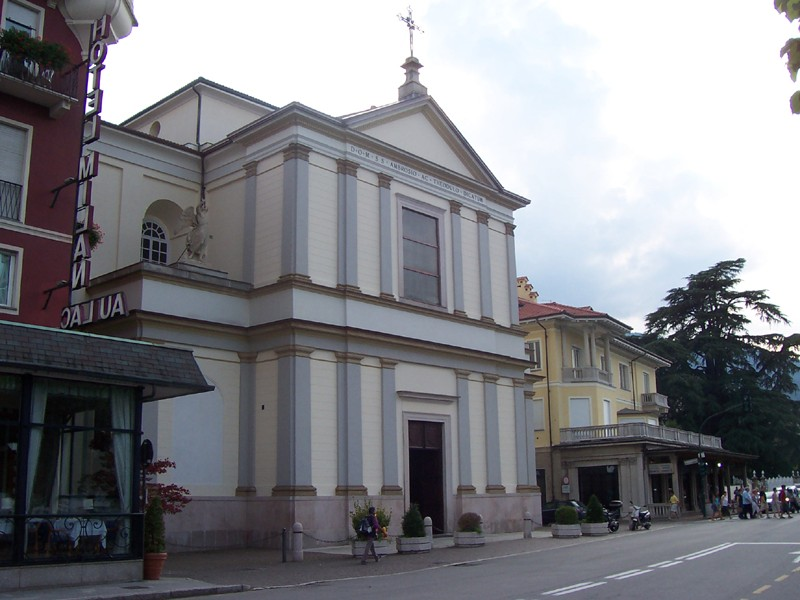 Stresa - Chiesa Parrocchiale dei Ss. Ambrogio e Teodulo